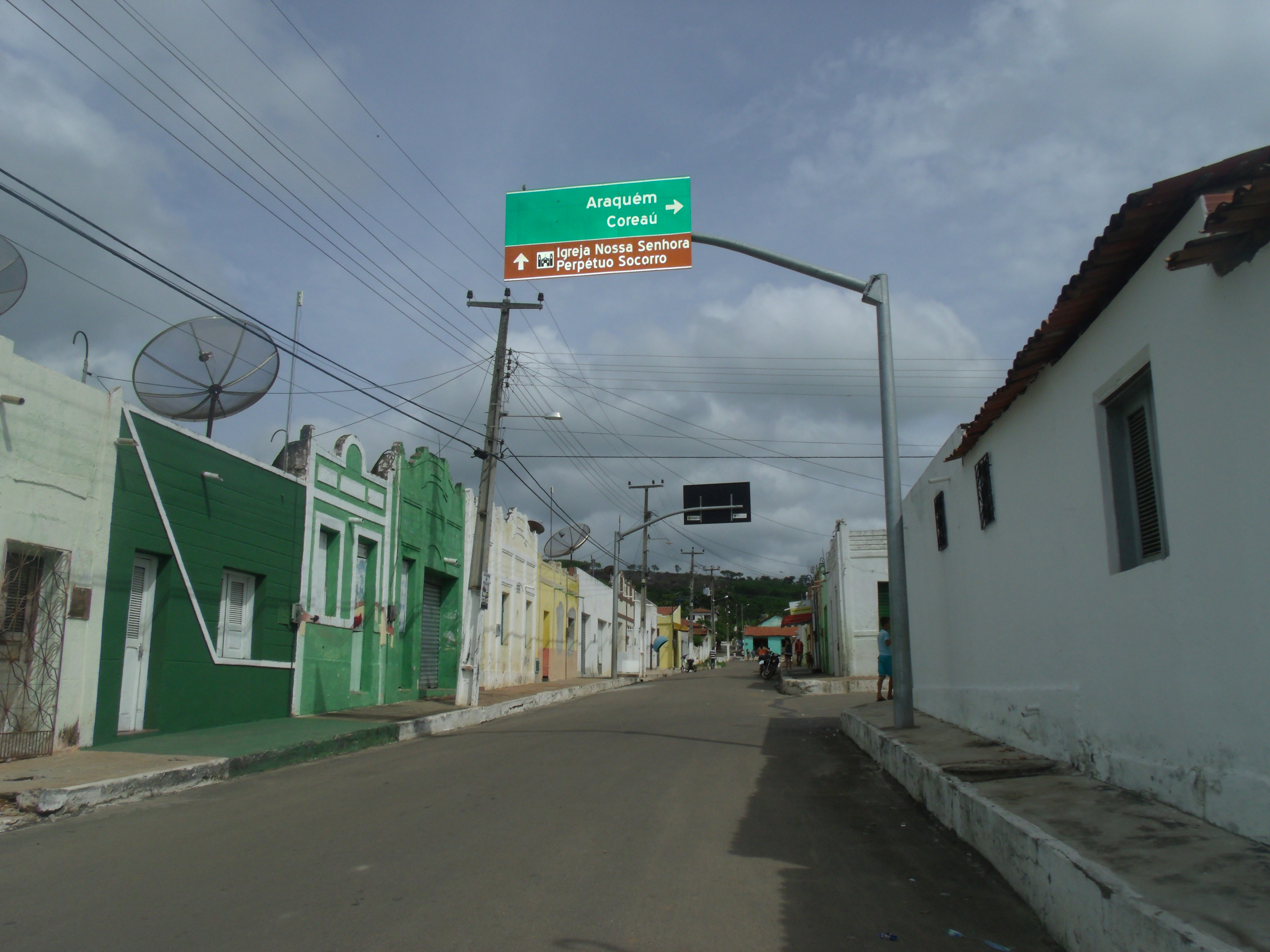 Vista do centro histórico de Arapá, um distrito do município de Tianguá, Ceará.